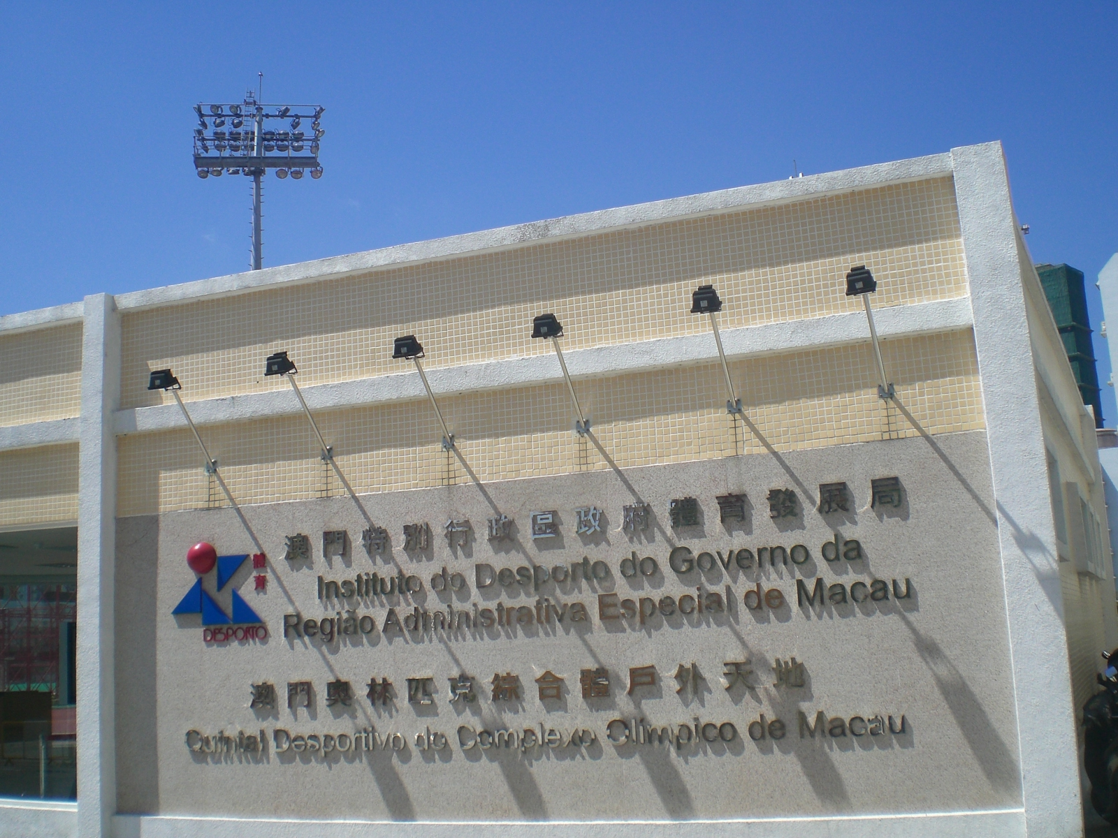 澳門運動場（葡萄牙語:Estádio Campo Desportivo；英語:Macau Stadium）是位於zh:氹仔奧林匹克大馬路的運動場.